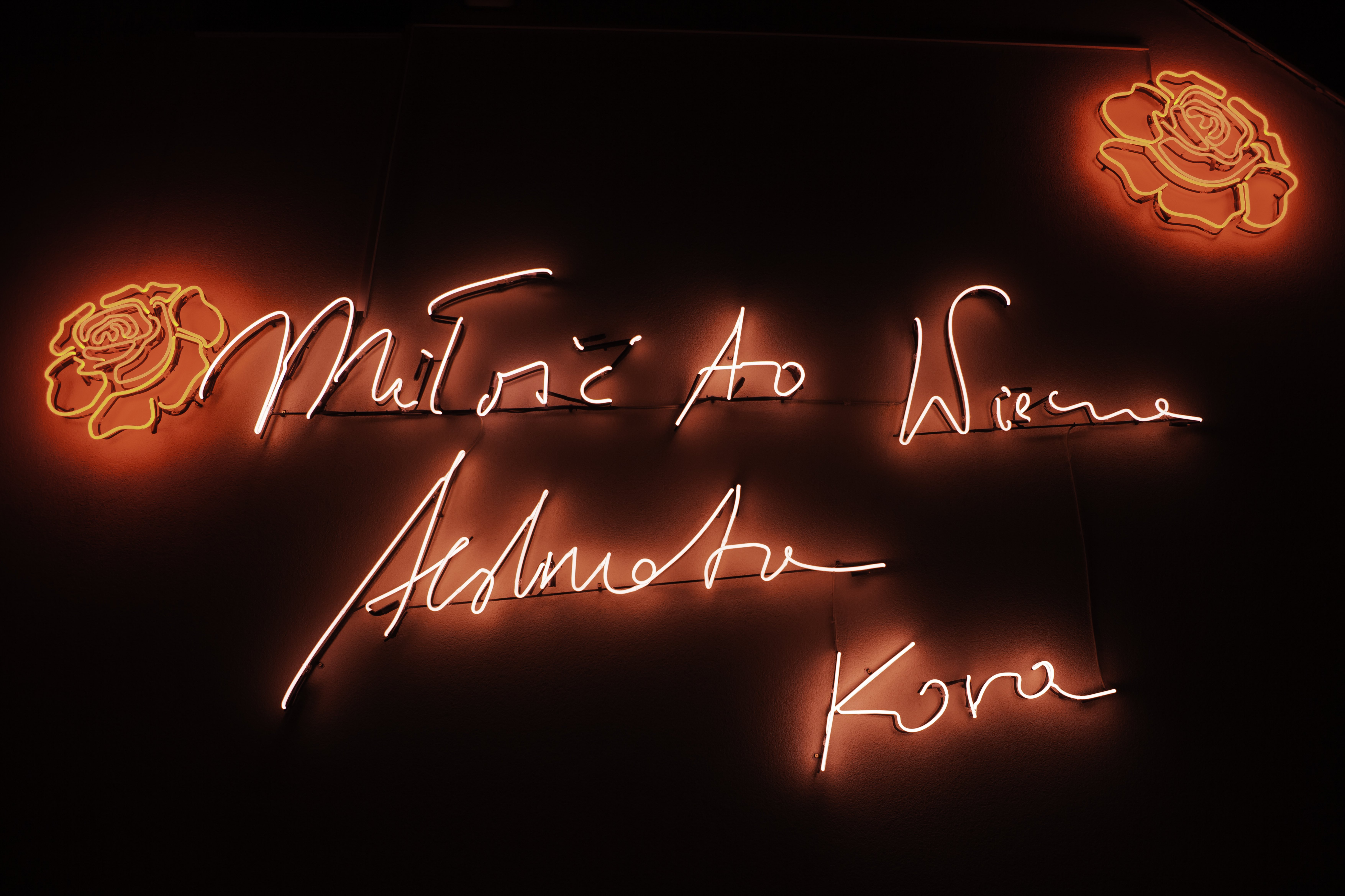 17 grudnia 2018 roku Kamil Sipowicz odsłonił neon "Miłość to wieczna tęsknota" nawiązujący do tekstu z piosenki "Anioł" z repertuaru Maanamu. Autorem projektu jest Paulina Ołowska.